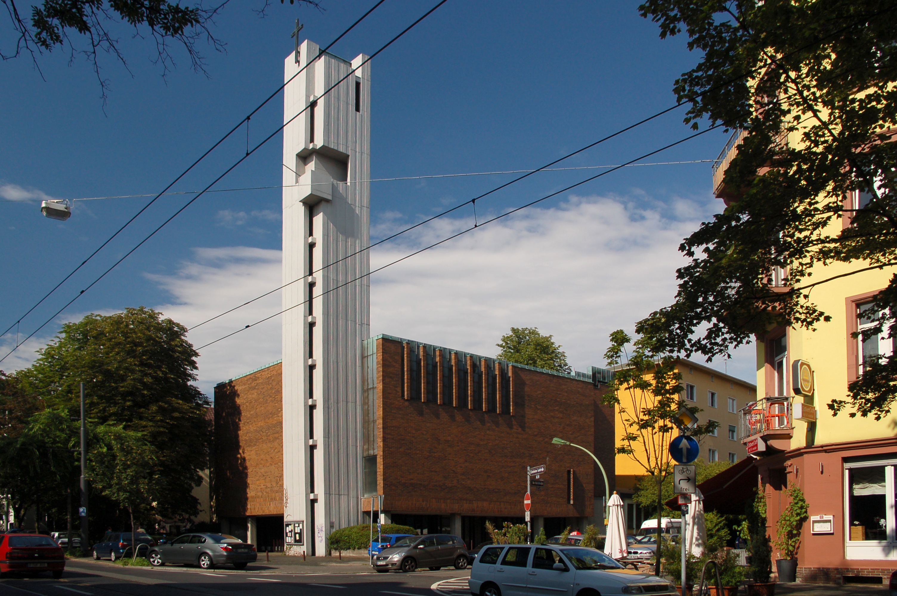 Gethsemanekirche Frankfurt am Main, Eckenheimer Landstraße/Neuhofstraße